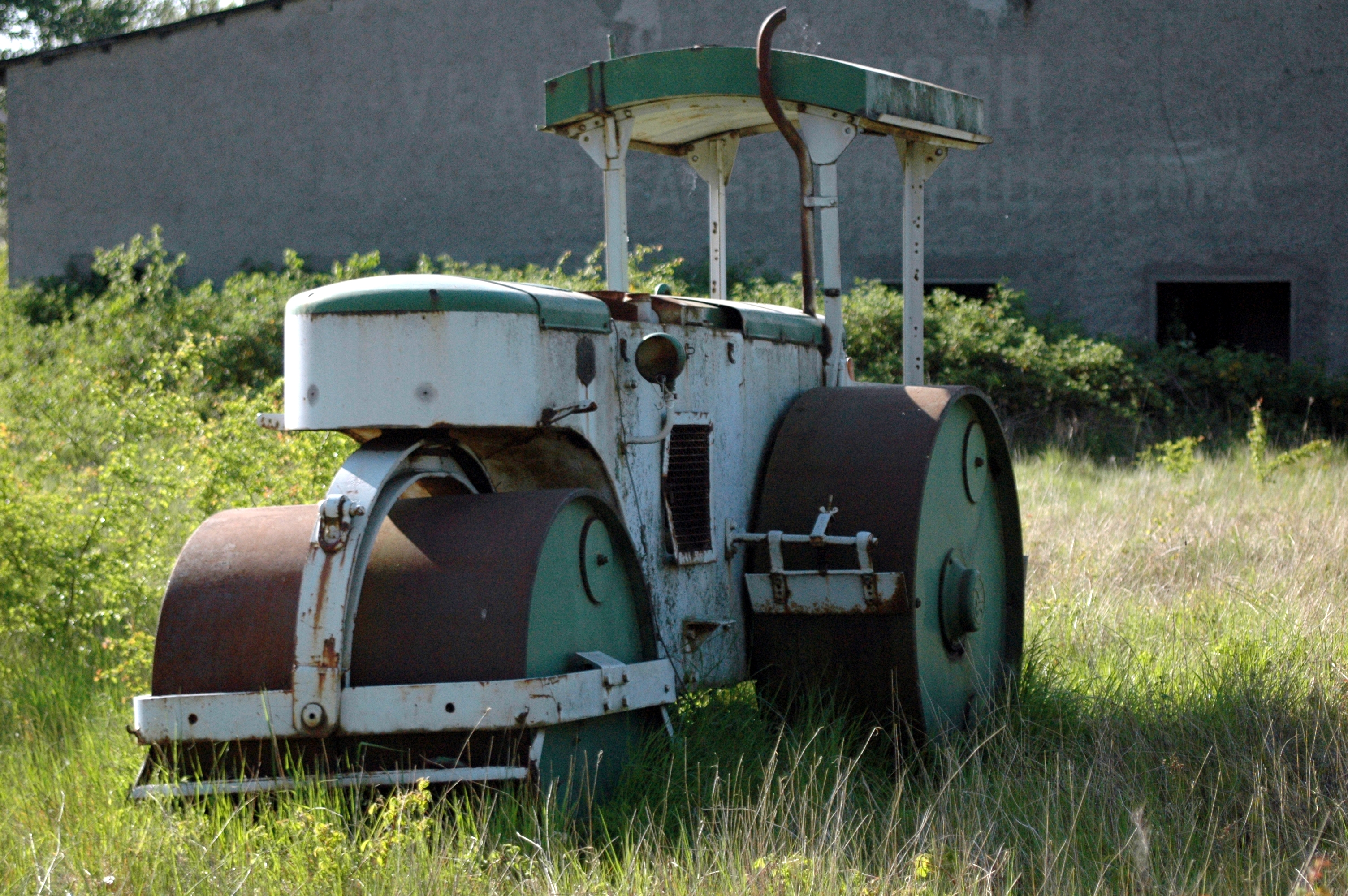 Hatra Kemna Dreiradwalze Typ Gigant Rehna. Hatra war seit 1949 Lizenznehmer von Kemna in Breslau.